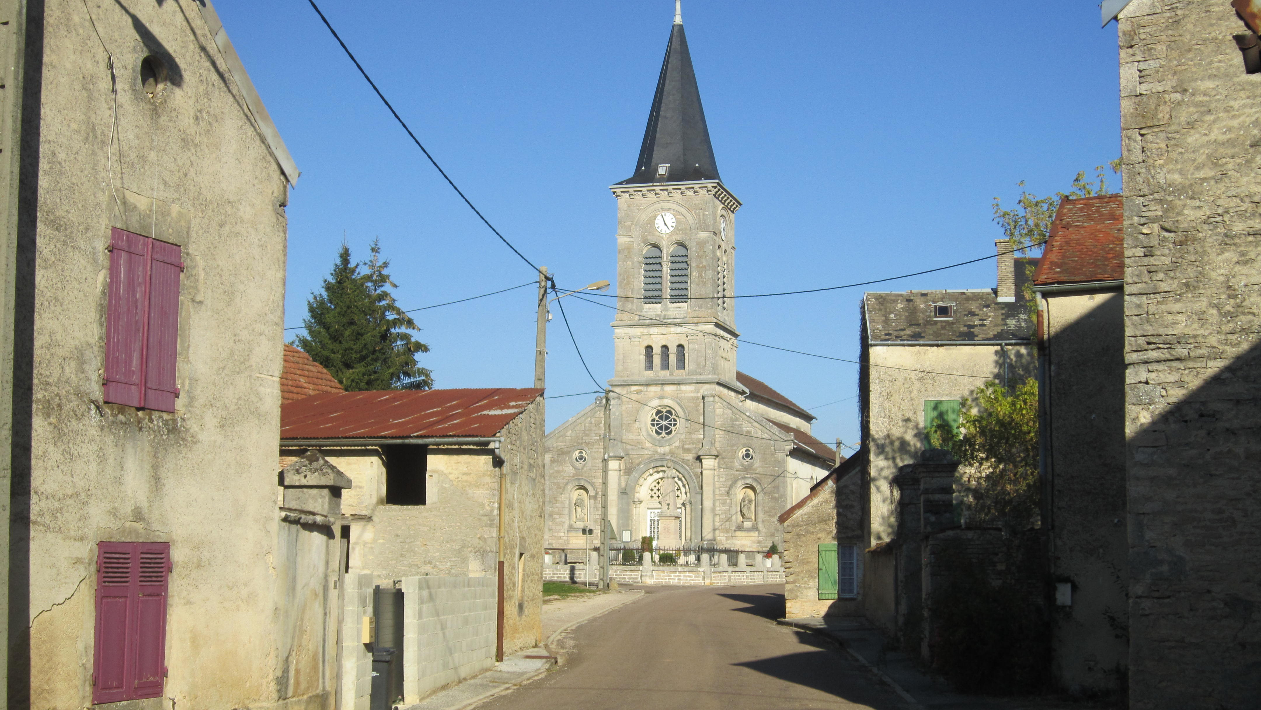 Louesme (Côte-d'Or)